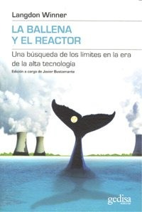 Portada del llibre "La Ballena y el Reactor", de Langdon WInner.